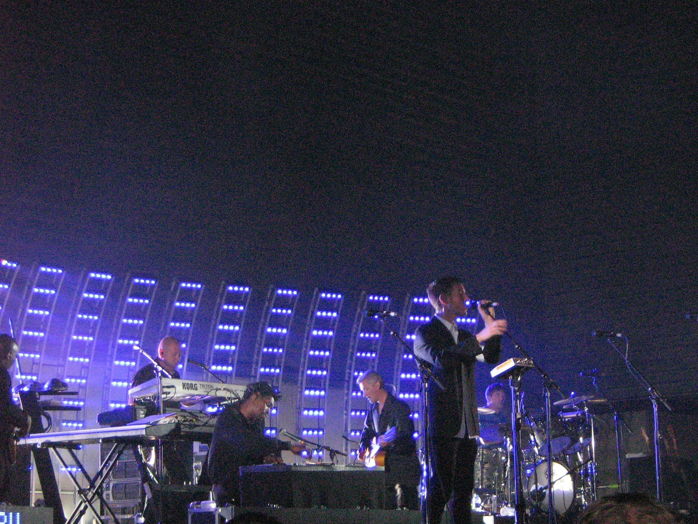 Massive Attack en concierto el BEC, Barakaldo.